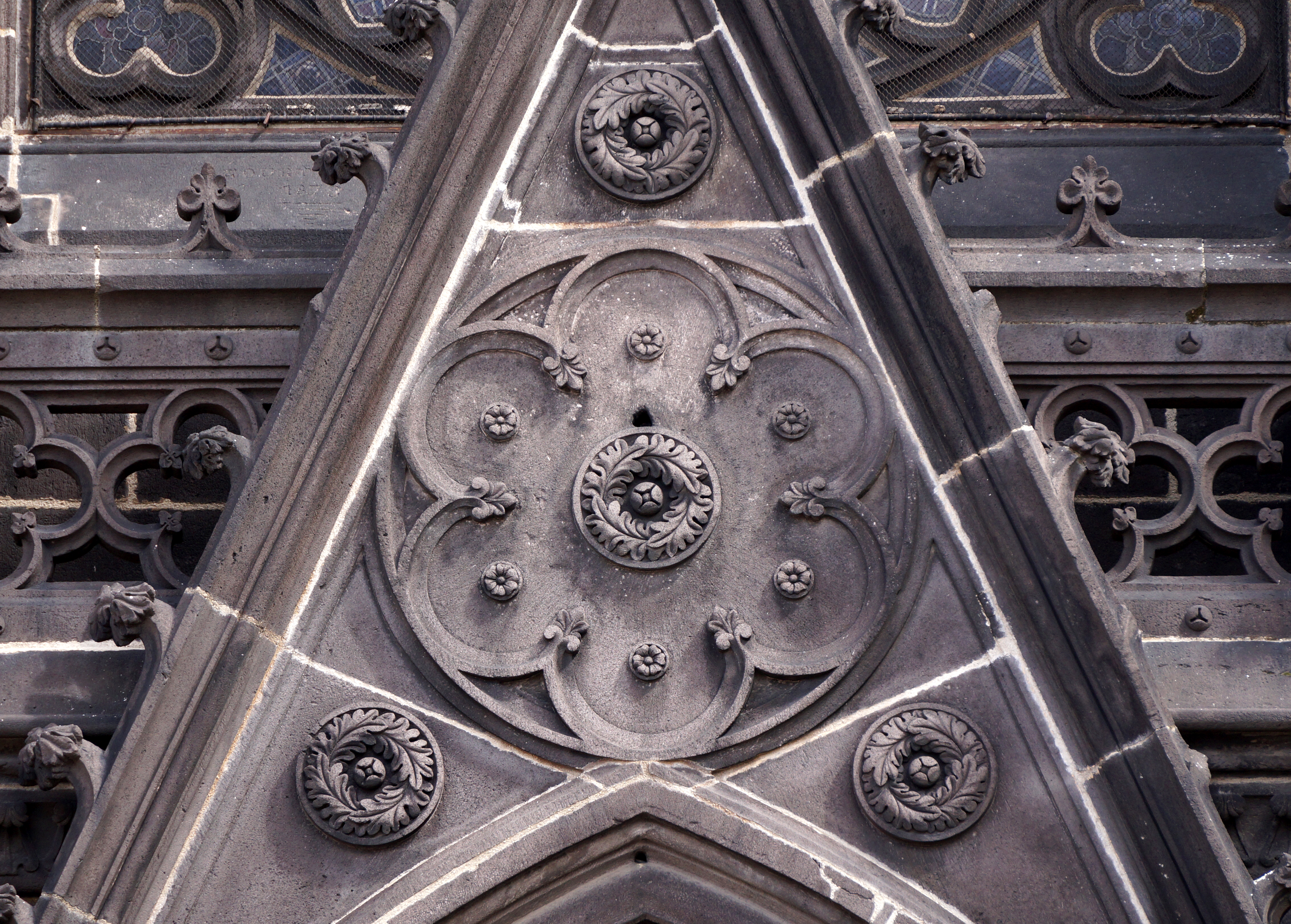 Gable du portail de la façade principale de l'église Saint-Eutrope de Clermont-Ferrand (63). .